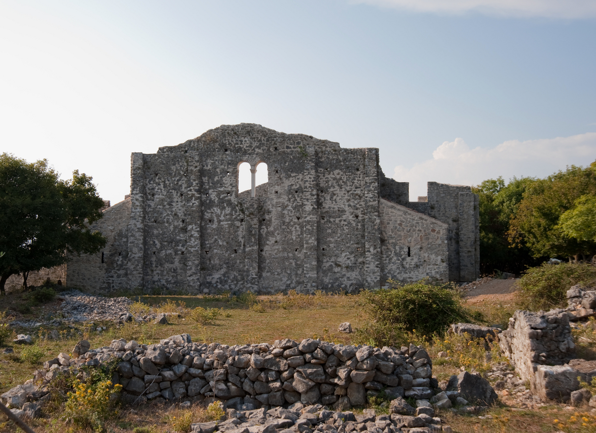 Ranokršćanski kompleks na lokalitetu Mirine u uvali Sepen blizu Omišlja